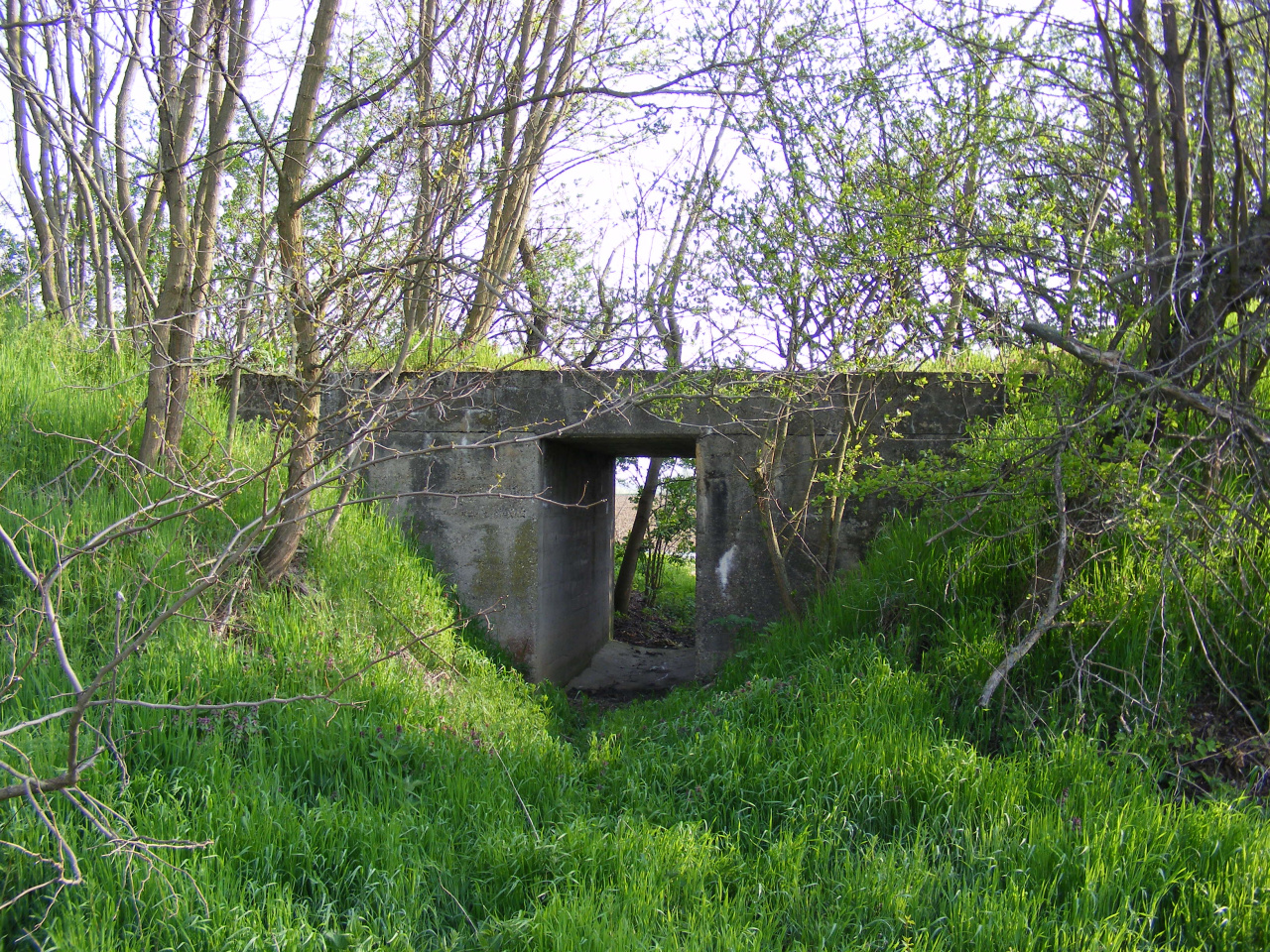 Nyomvonalkorrekció miatt felhagyott áteresz az Osztopán-Somogyjád állomásközben